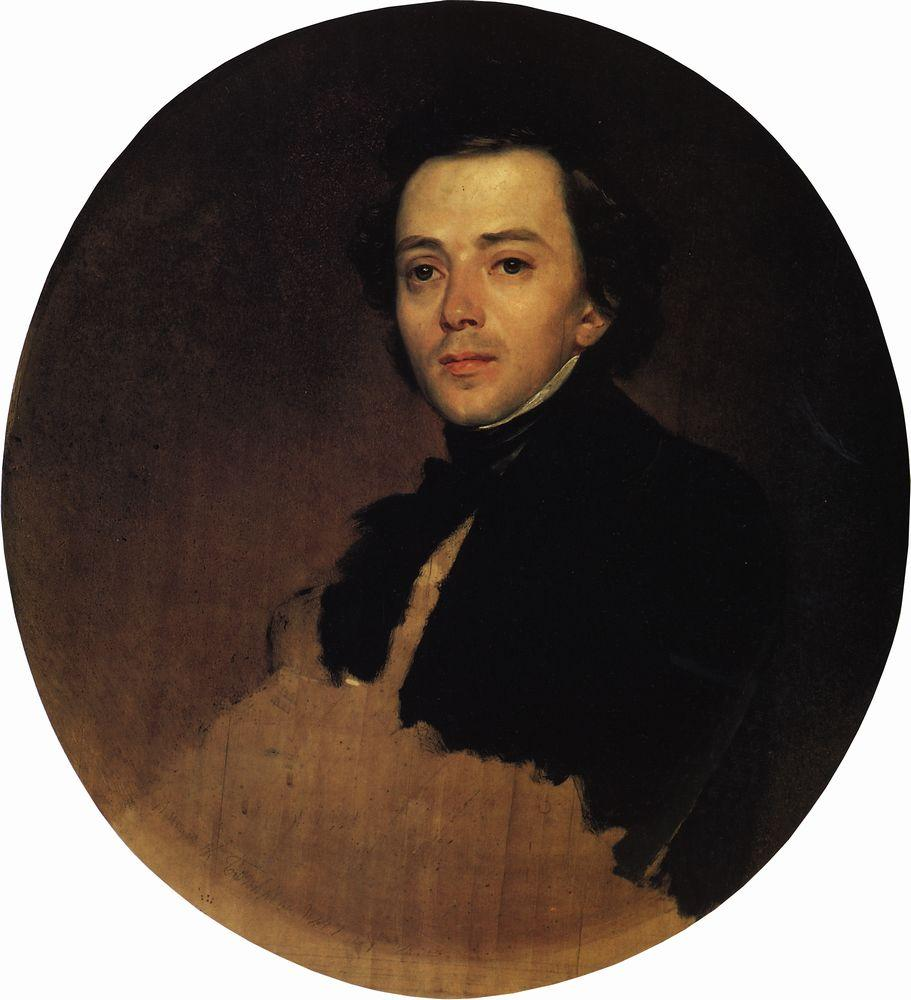 Портрет актера В. В. Самойлова. 1847